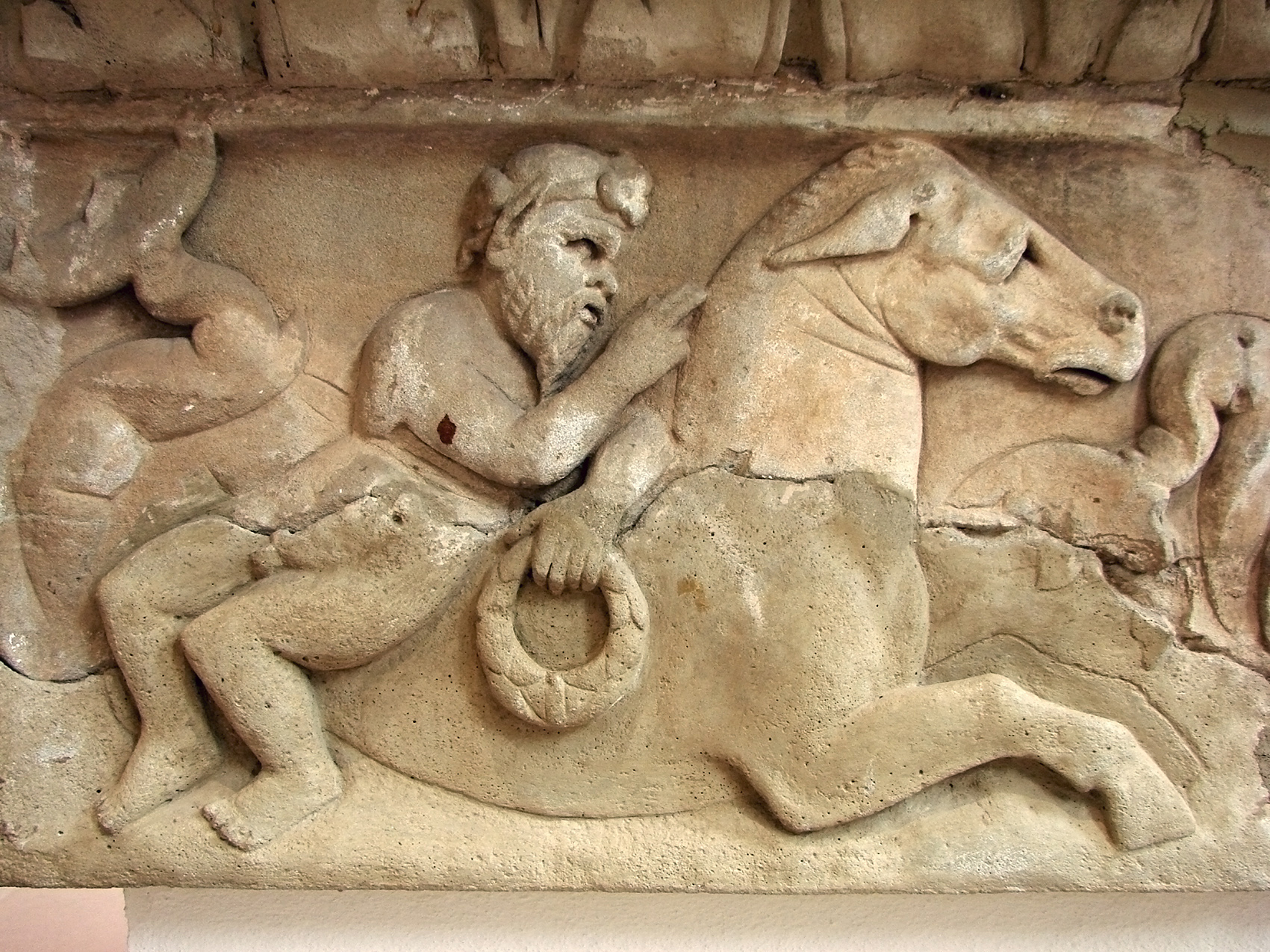 Bas-relief d'autel funéraire, époque romaine, en grès: Silène?. Rheinisches Landesmuseum à Trèves.